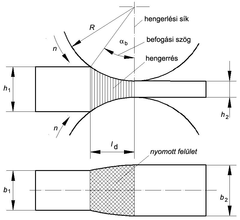 Vázlat az elemi hengerléshez